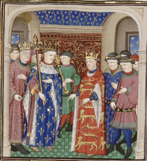 Filip VI. a Eduard III.